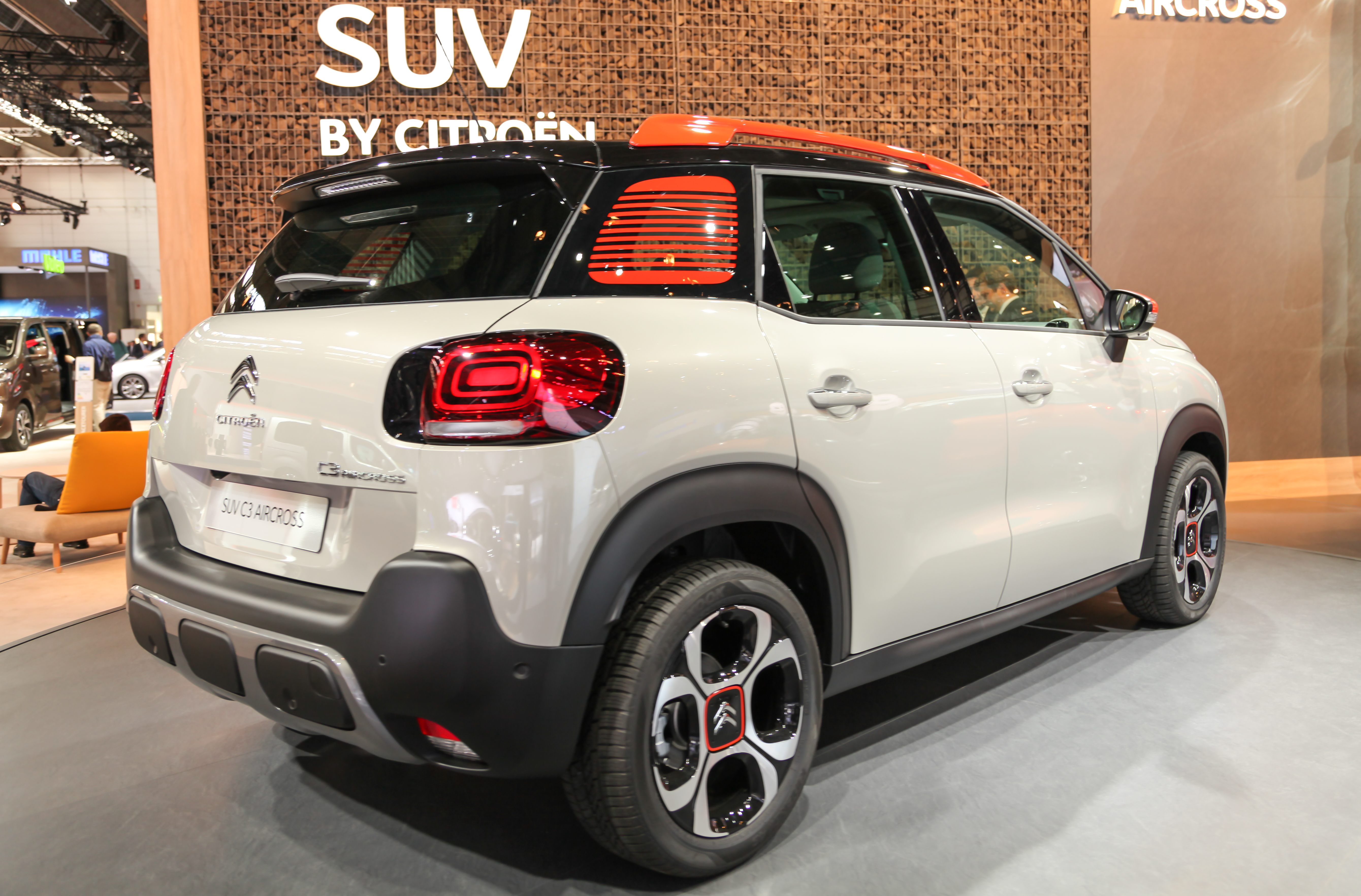 Citroën C3 Aircross